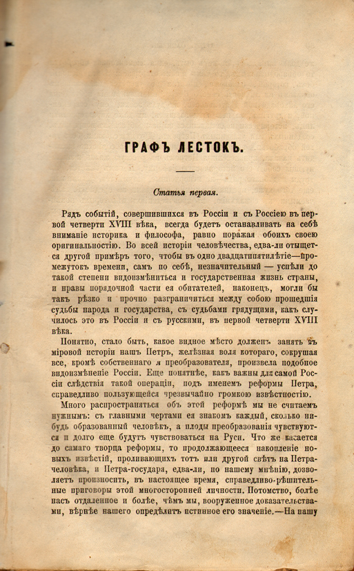 «Граф Лесток», статья М.Д.Хмырова